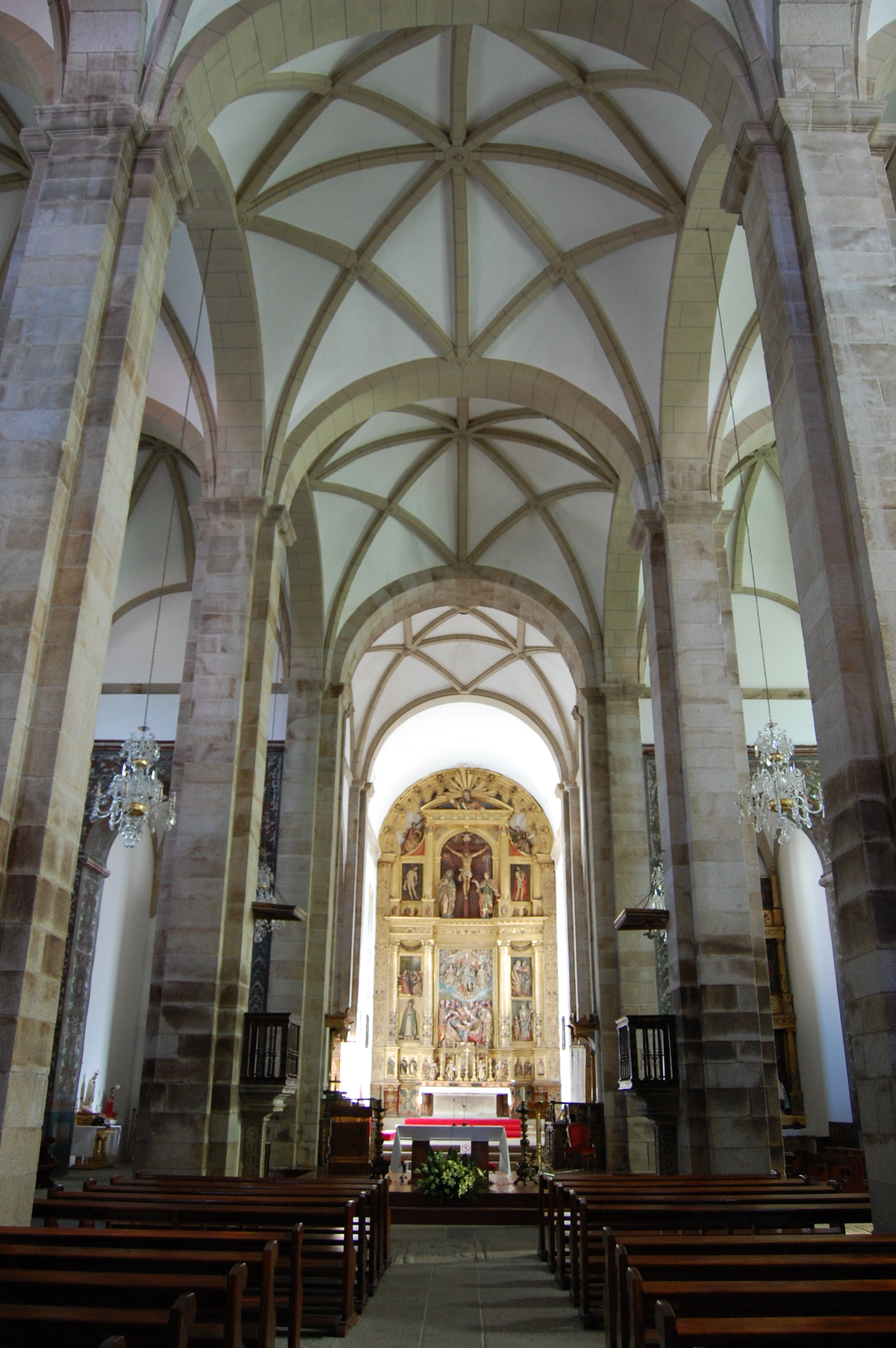 Miranda do Douro, Portugal.